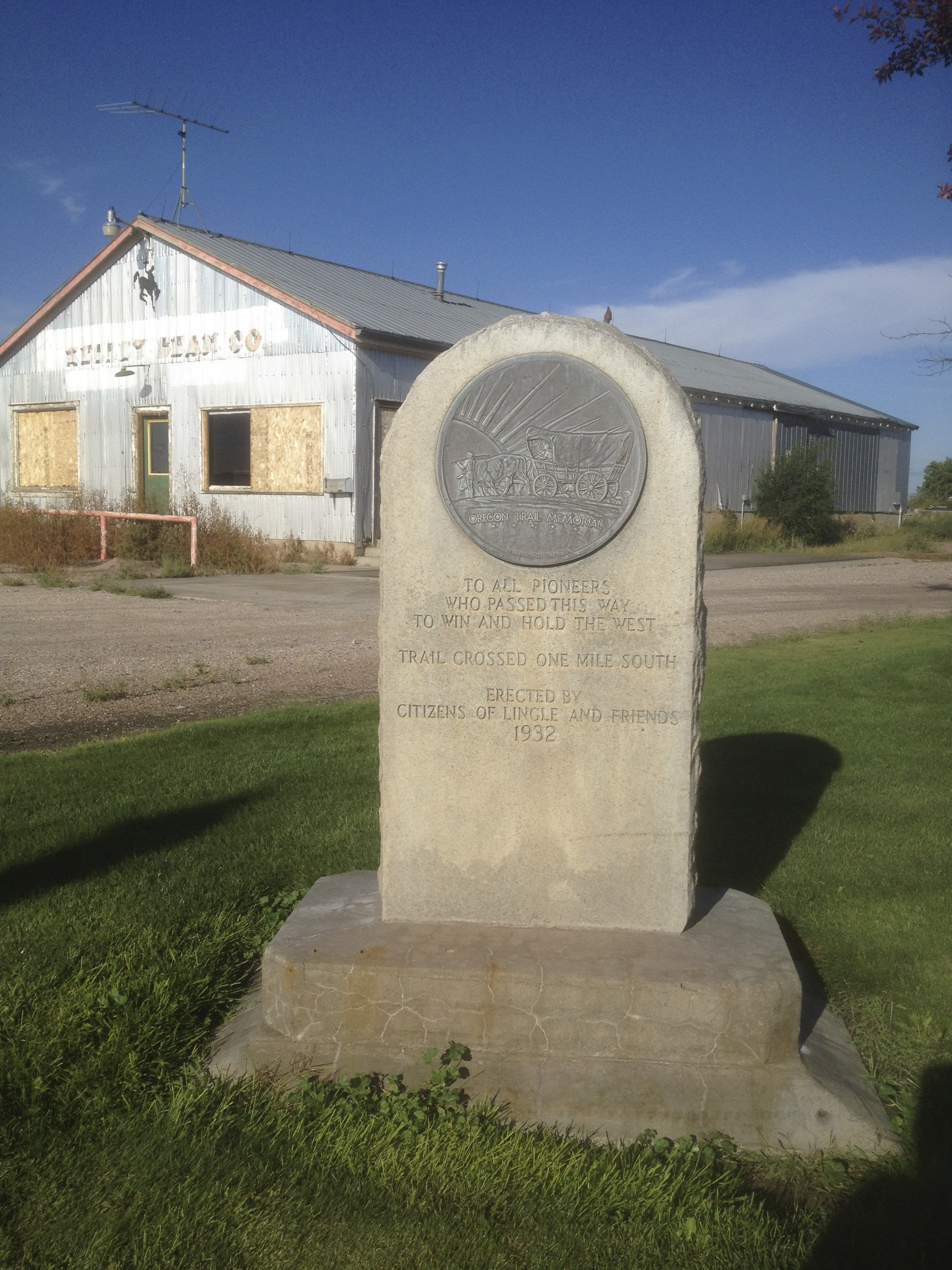 Oregon Trail memorial, Lingle WY